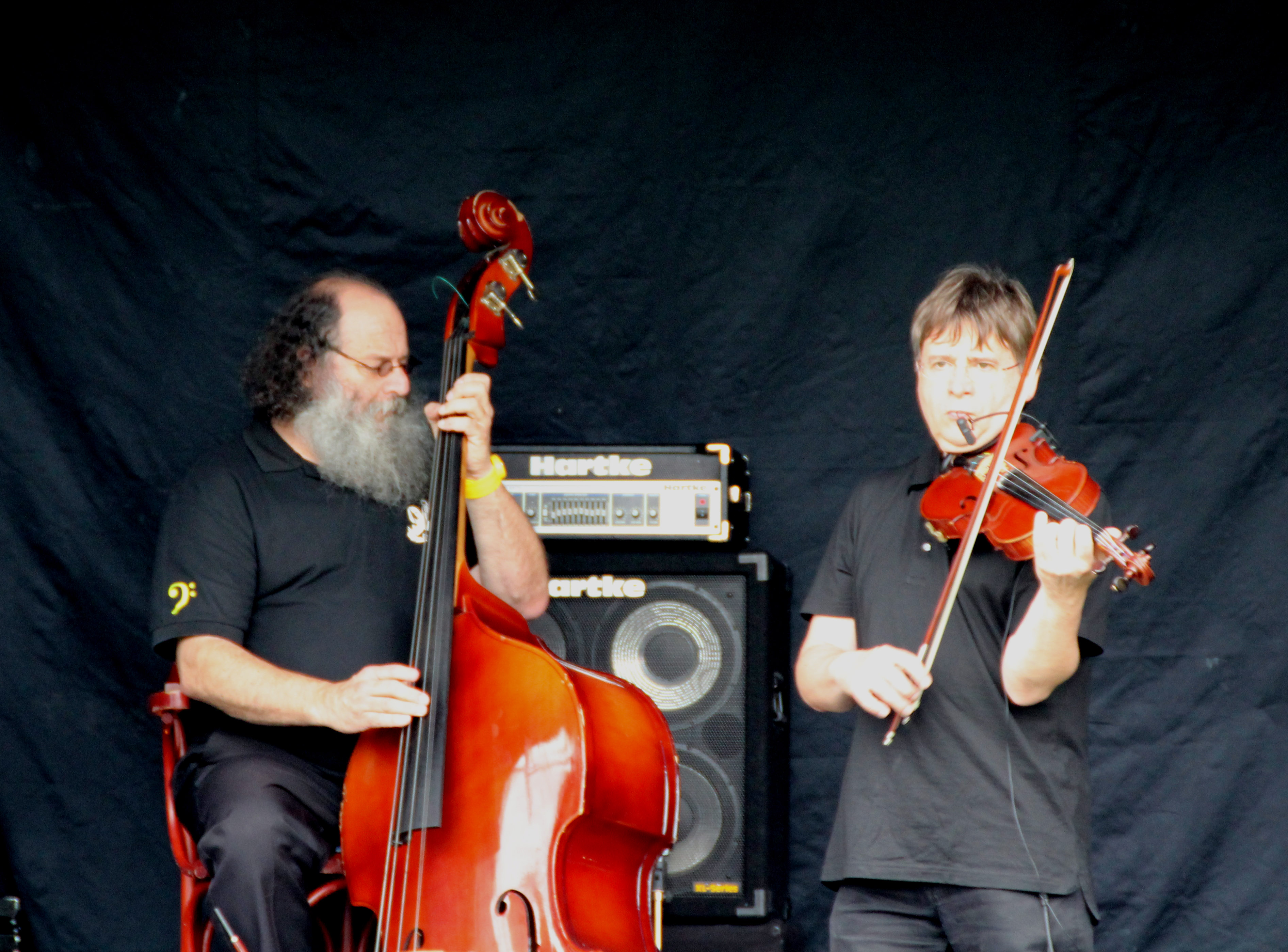 Groupe musical Amzelam